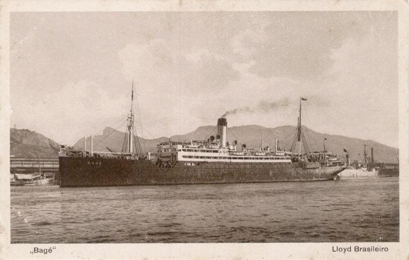 Fotografia do vapor brasileiro Bagé (ex-Sierra Nevada). A fotografia foi tirada provavelmente no final da década de 1920, ocasião da reestruturação da Companhia Lloyd Brasileiro, na qual todos os navios da frota retratados em cartões postais de propaganda da empresa. O navio foi afundado em 01 de agosto de 1943 pelo submarino alemão U-185.